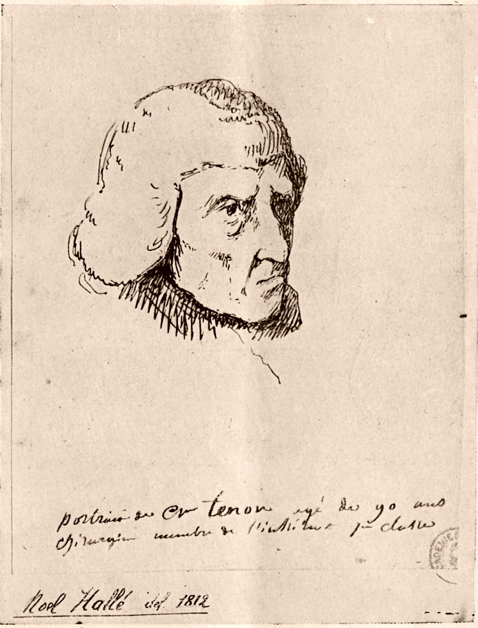 Portrait de Jacques Tenon âgé de 90 ans, chirurgien membre de l'Institut